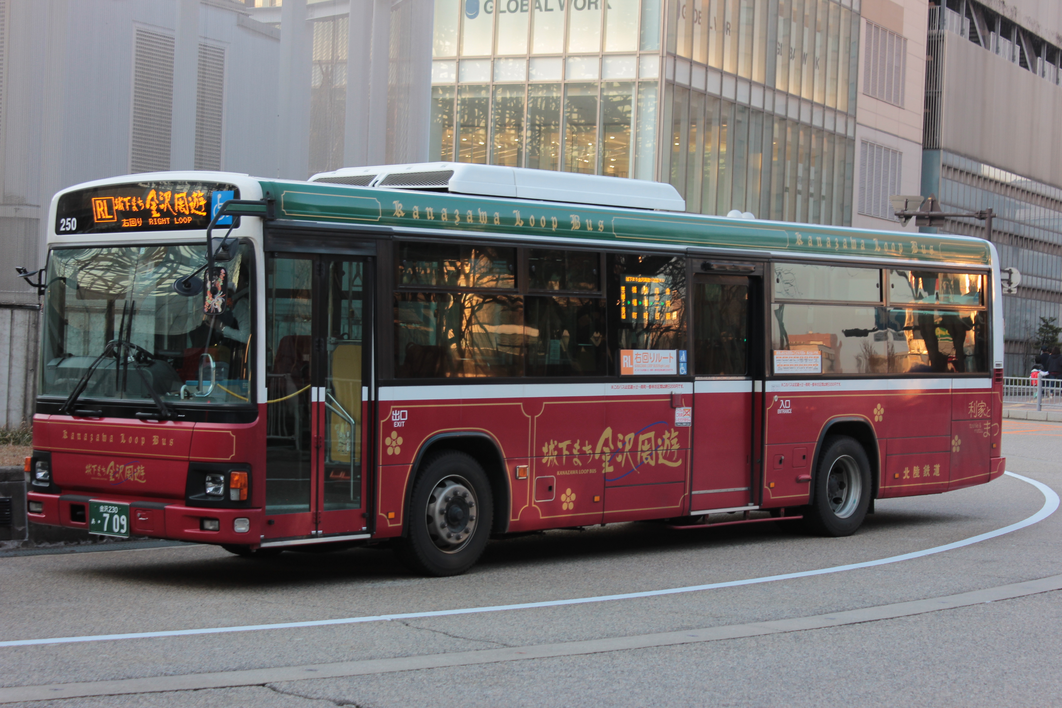 北陸鉄道の城下まち金沢周遊（右回りルート） Canon EOS Kiss X5